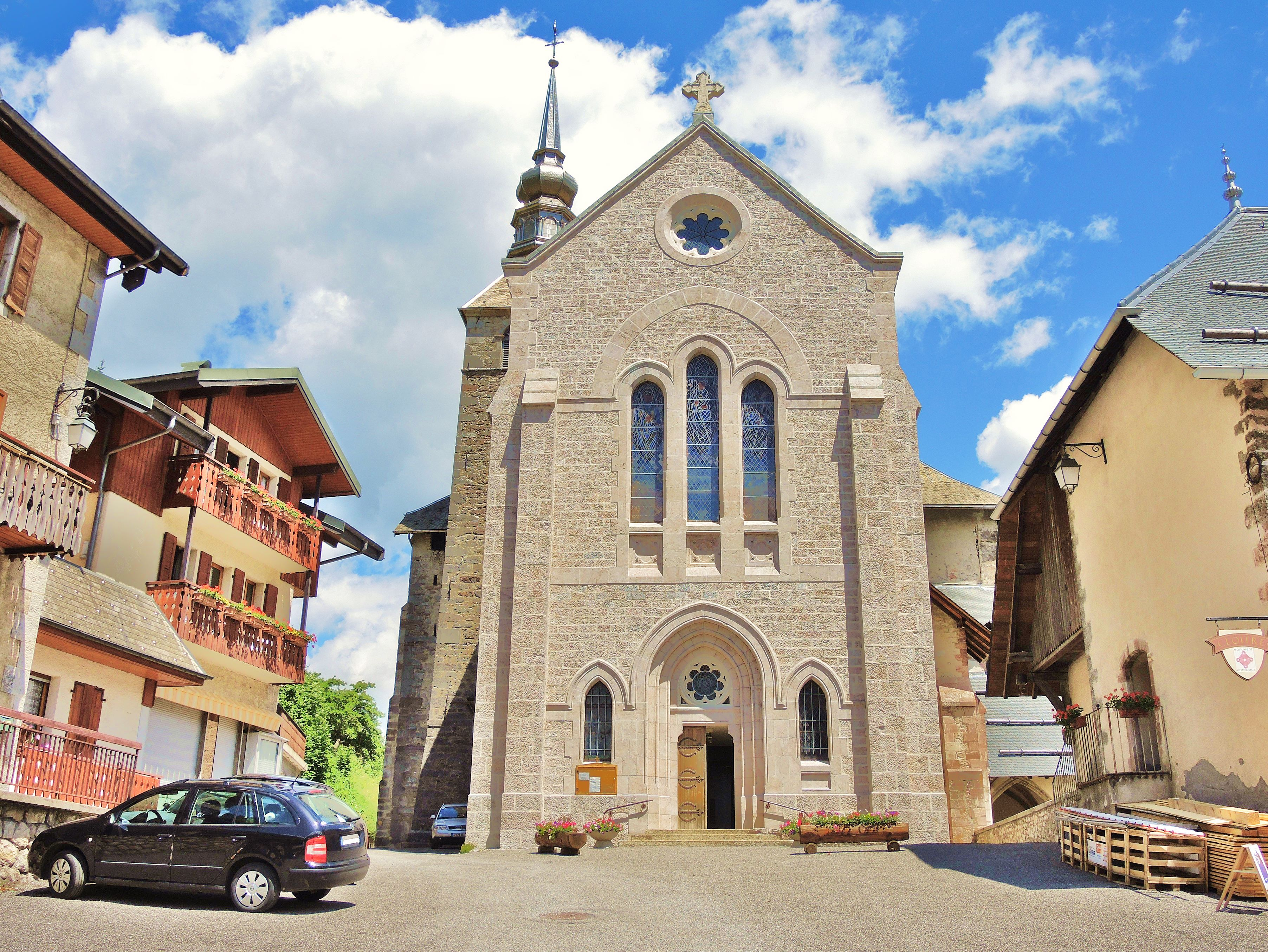 Eglise Notre dame de l'Assomption.